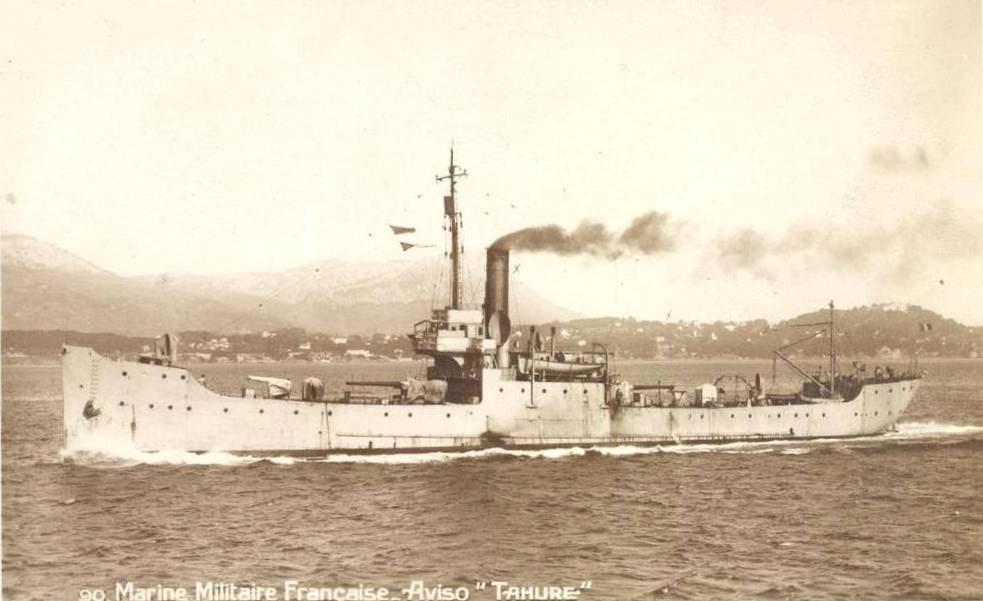 L'aviso Tahure de la marine militaire française avant 1939